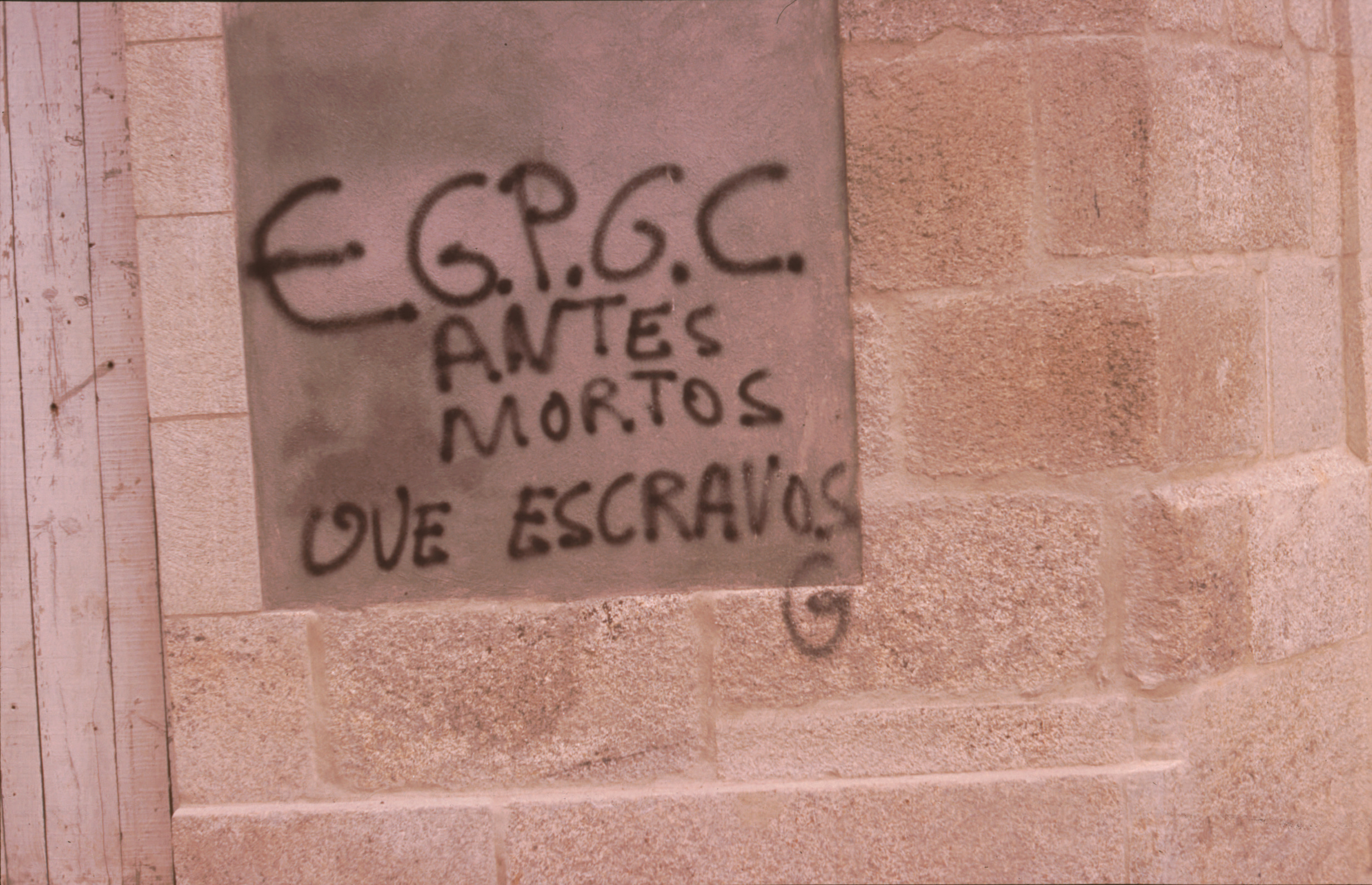 Pintada del Exército Guerrilheiro do Povo Galego Ceive, "Antes mortos que escravos".